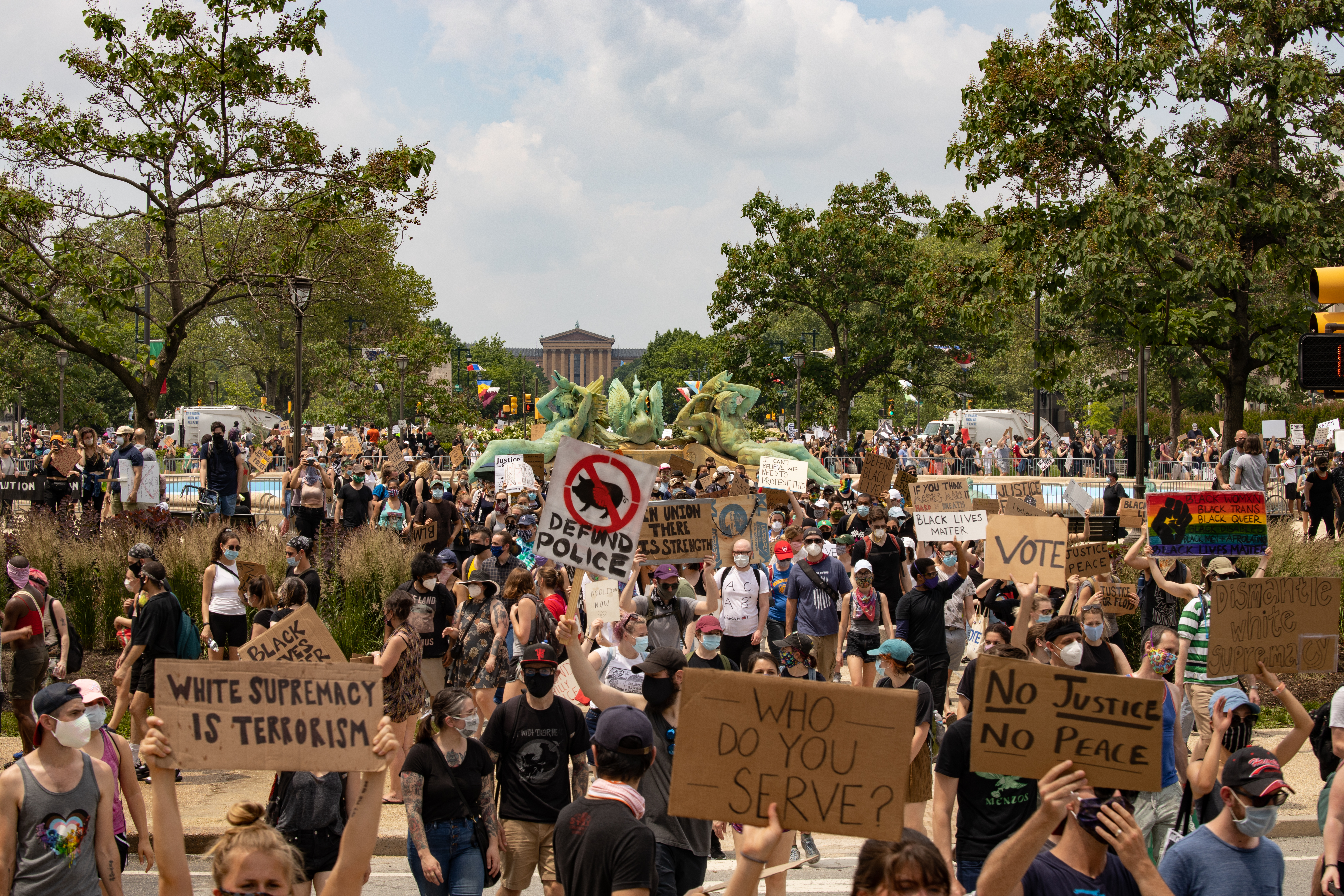 George Floyd protests in Philadelphia